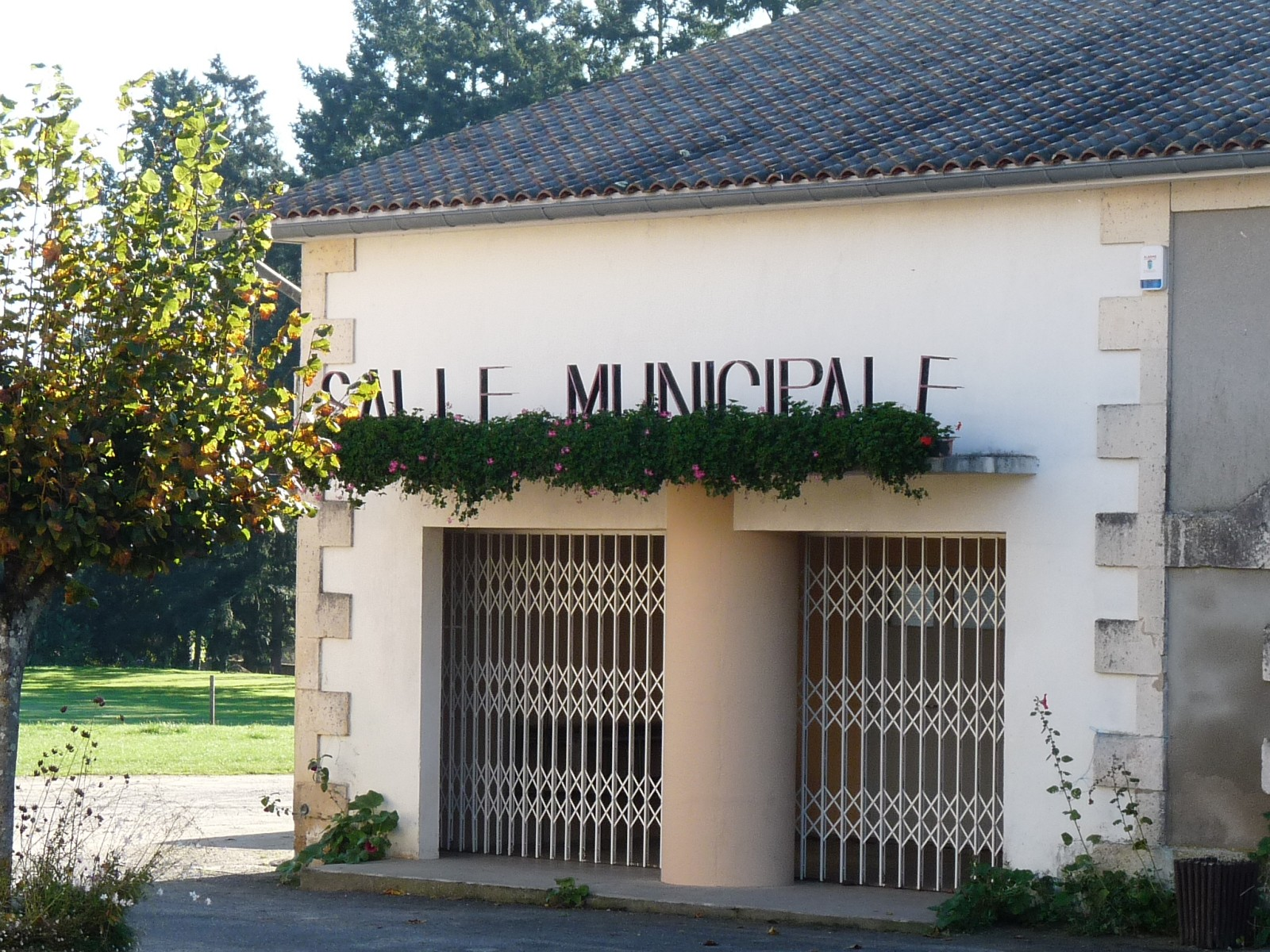 Salle des fêtes, Saint-Martin-de-Coux, Charente-Maritime, France